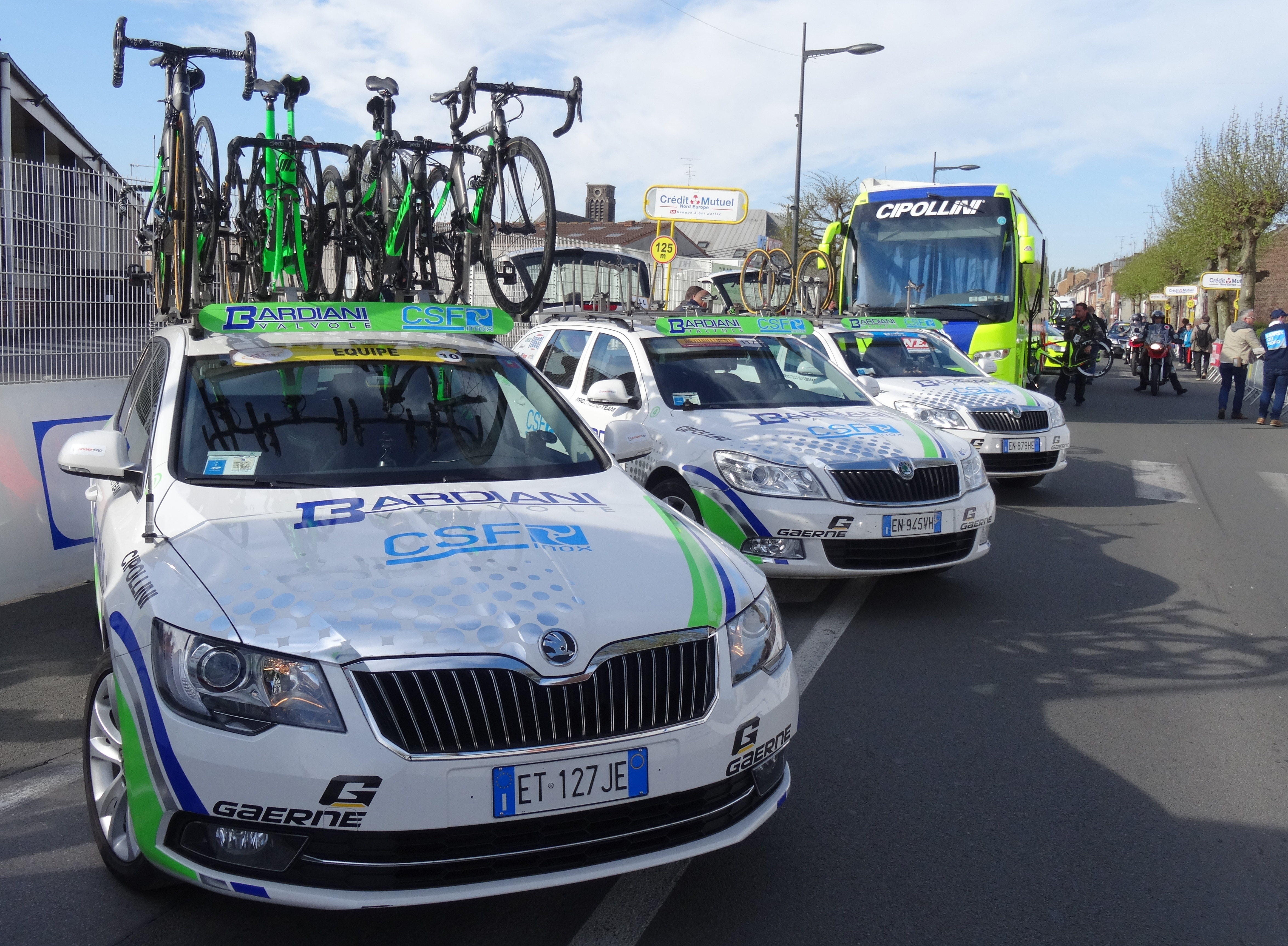 Reportage réalisé le jeudi 17 avril à l'occasion du départ et de l'arrivée du Grand Prix de Denain 2014 à Denain, Nord, Nord-Pas-de-Calais, France.